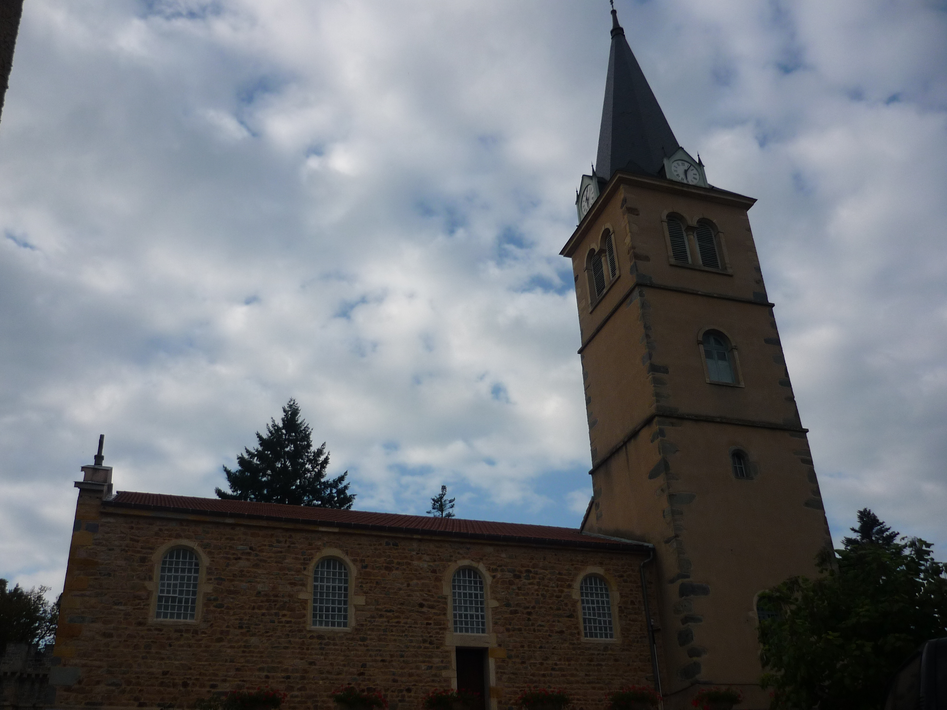 Église de Claveisolles, dans le département du Rhône